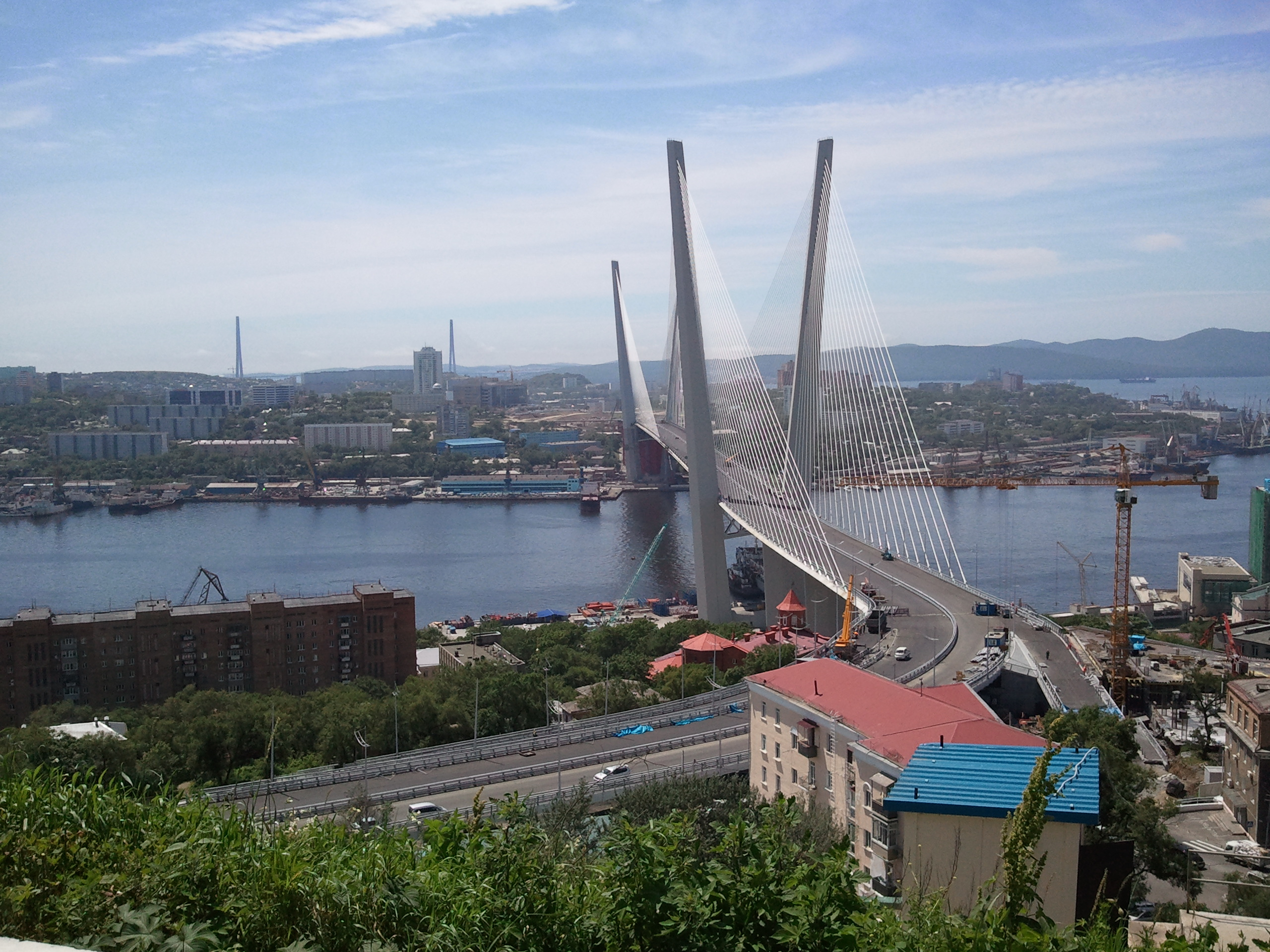 Мост через Золотой Рог, Владивосток (на заднем плане мост на Русский остров)